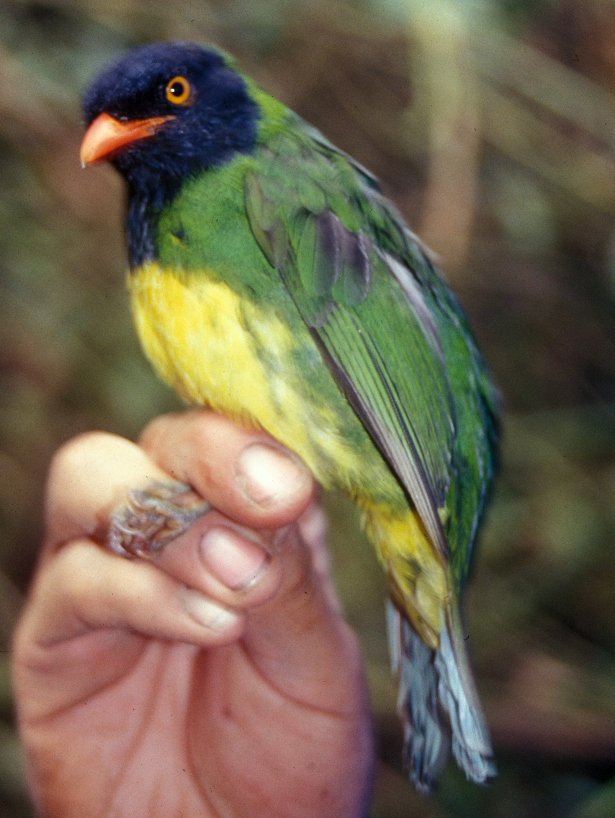 Black-chested Fruiteater (Pipreola lubomirskii) in Ecuador